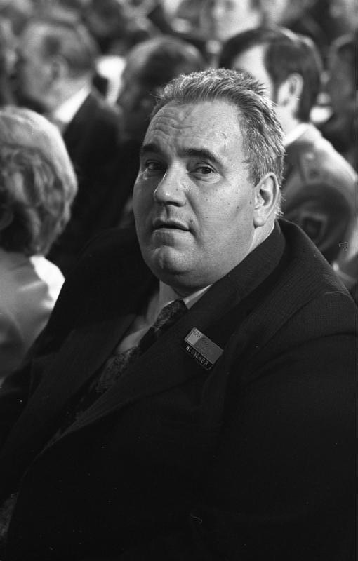 Bundesparteitag der SPD in Hannover (Heinz Kluncker, ÖTV) 10.-14.4.1973